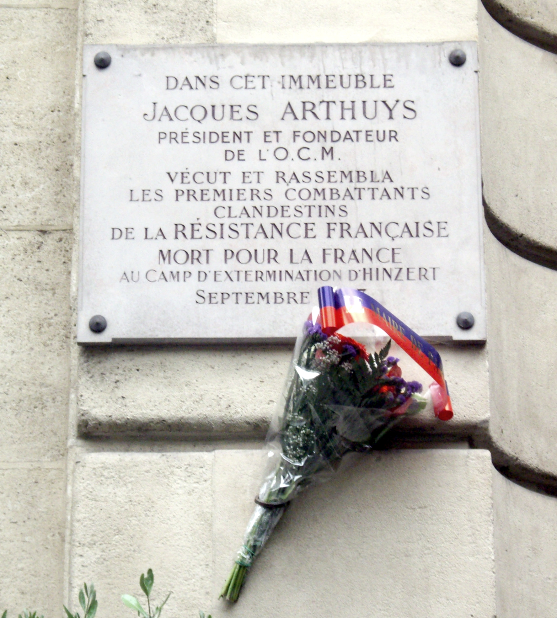 Plaque apposée au n° 72 de l'avenue Victor-Hugo, Paris 16e.« Dans cet immeuble, Jacques Arthuys, président et fondateur de l'OCM, vécut et rassembla les premiers combattants clandestins de la Résistance française. Mort pour la France au camp d'extermination d'Hinzert, septembre 1943. »